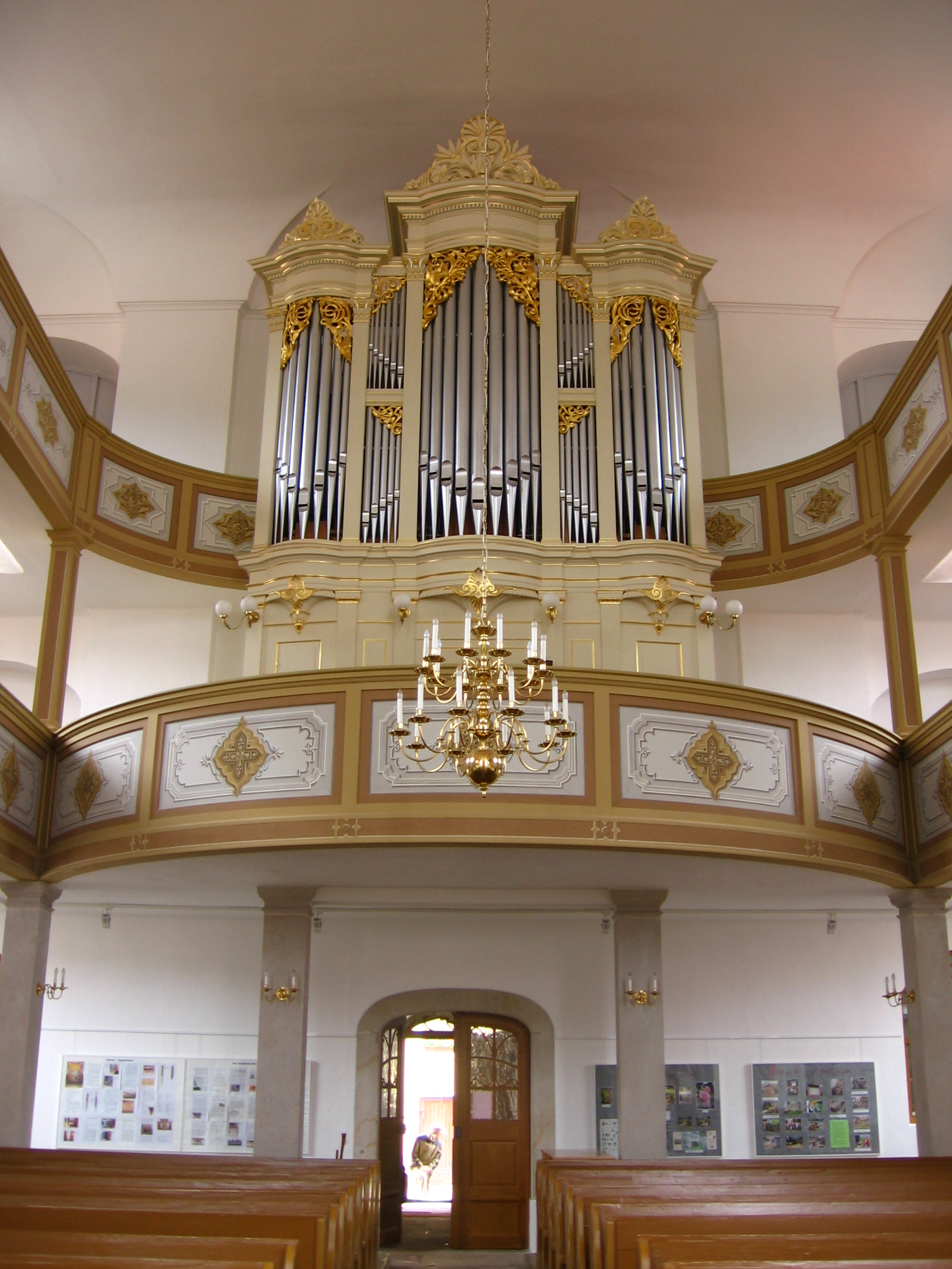 Stadtkirche St. Marien in Königstein (Sächsische Schweiz)